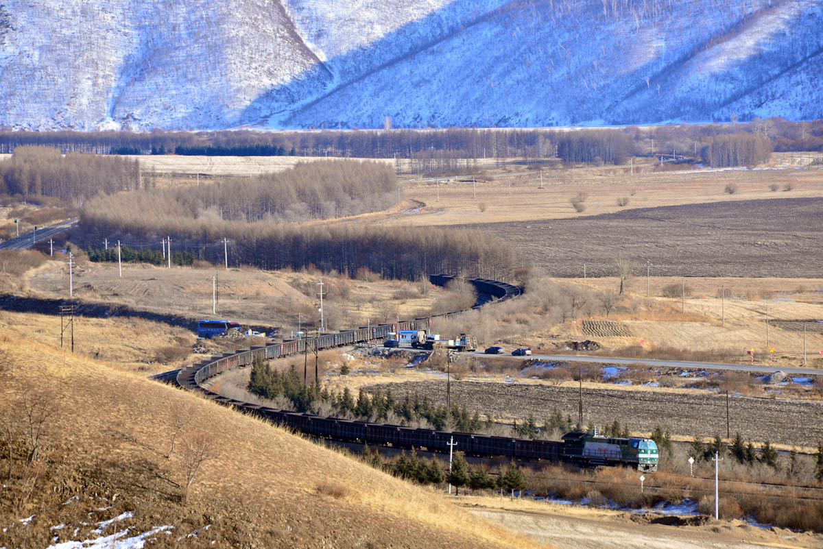 滨洲线k535公里的货车